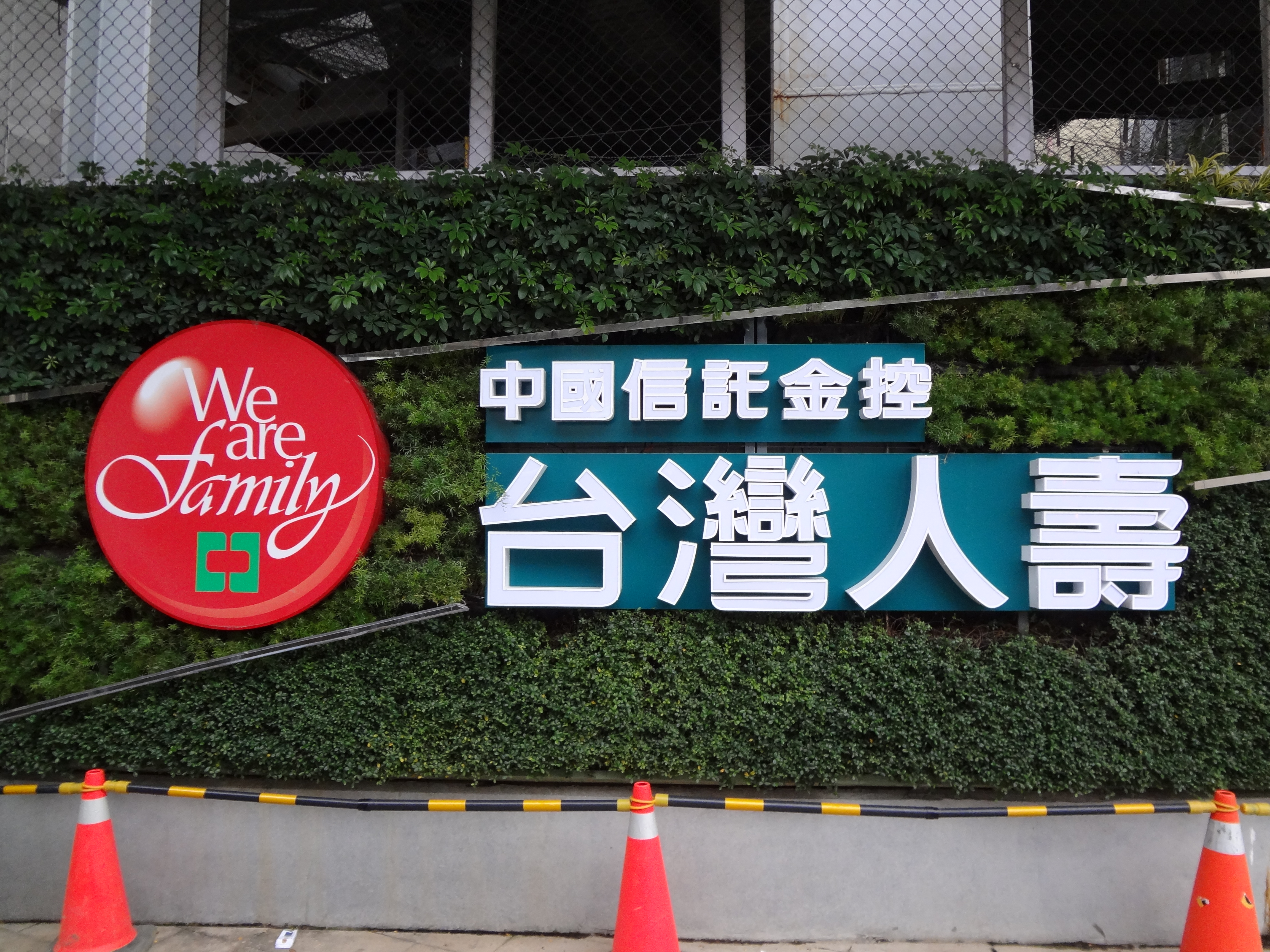 臺北市中正區中華路一段57號，大陸建設與台灣人壽興建中的寶慶路飯店案建築工地，植生牆上的中國信託金控台灣人壽商標燈箱。